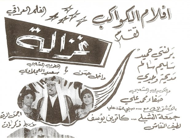 صورة لأفيش فيلم غزالة